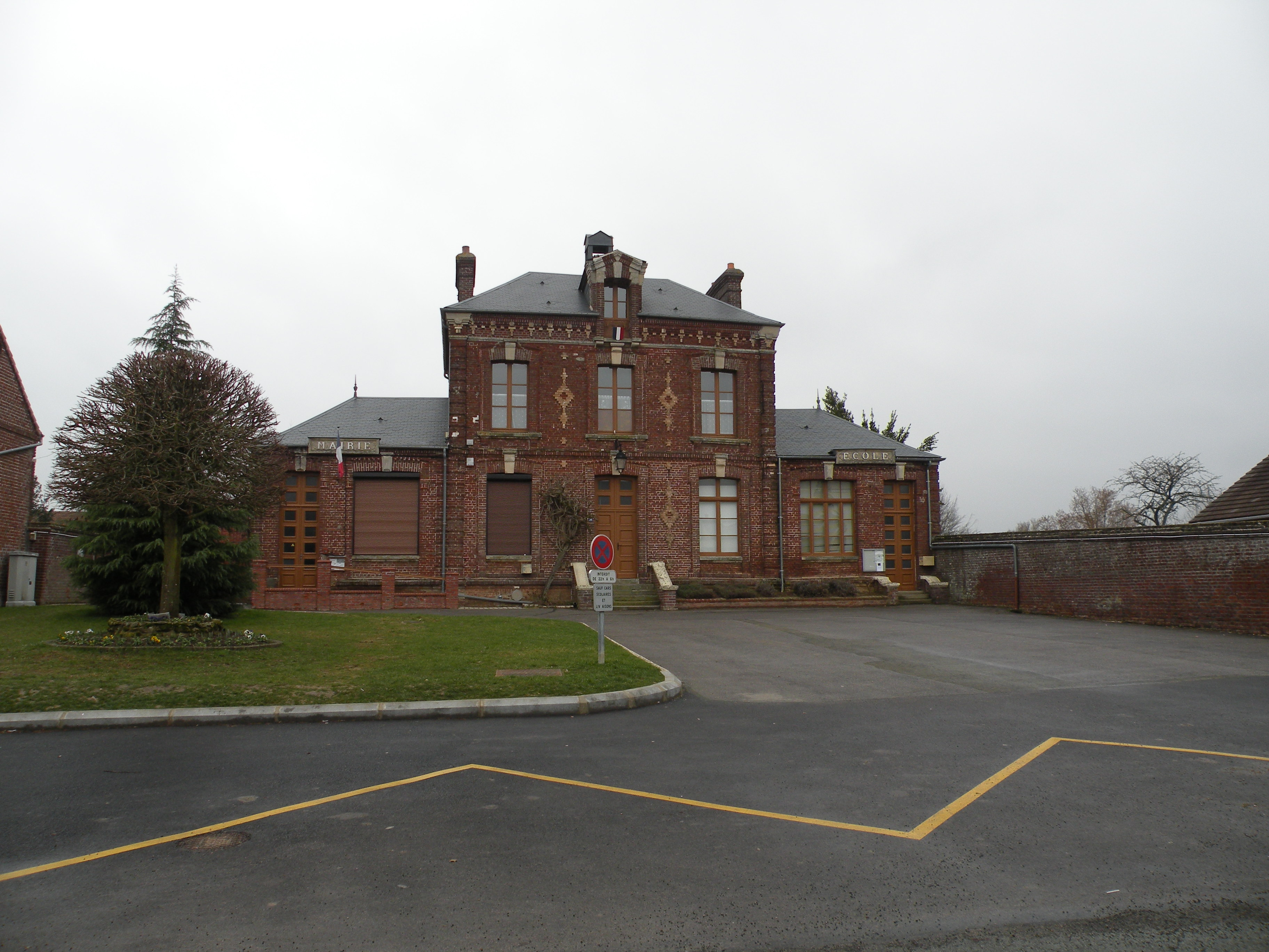 mairie école d'Abbecourt